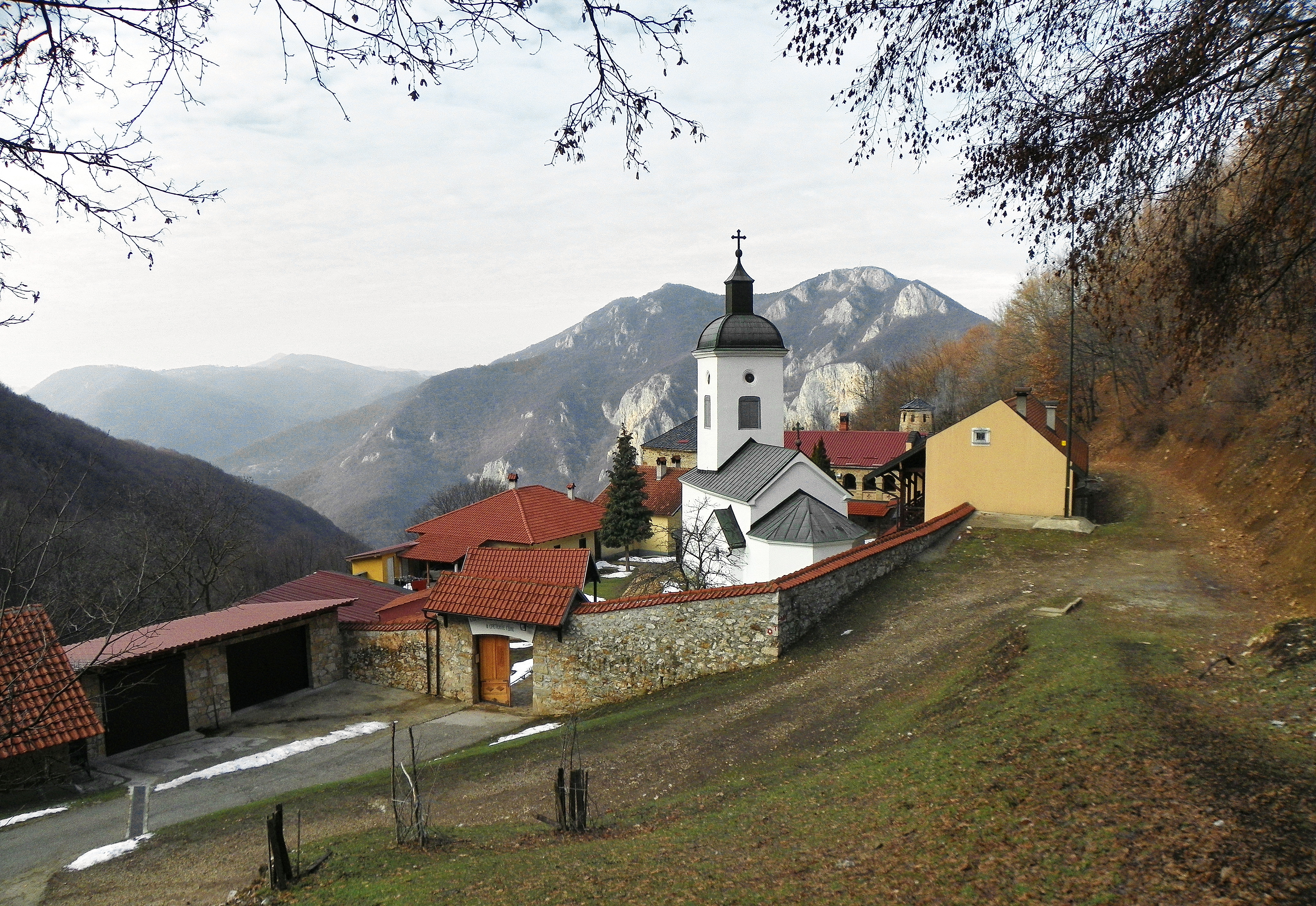 Манастирска црква је обновљена трудом монаха Нићифора Максимовића, који је после обнове манастира Преображења, 1818. године почео обнову манастира Сретење, тада је обновљена црква, конак, бедеми. По жељи Кнеза Милоша, ради великих заслуга је произведен за архимандрита манастира Сретење, а касније је хиротонисан за Епископа Ужичког, Нићифора Максимовића. Упокојио се 1853. године и сахрањен је у сретењској цркви.